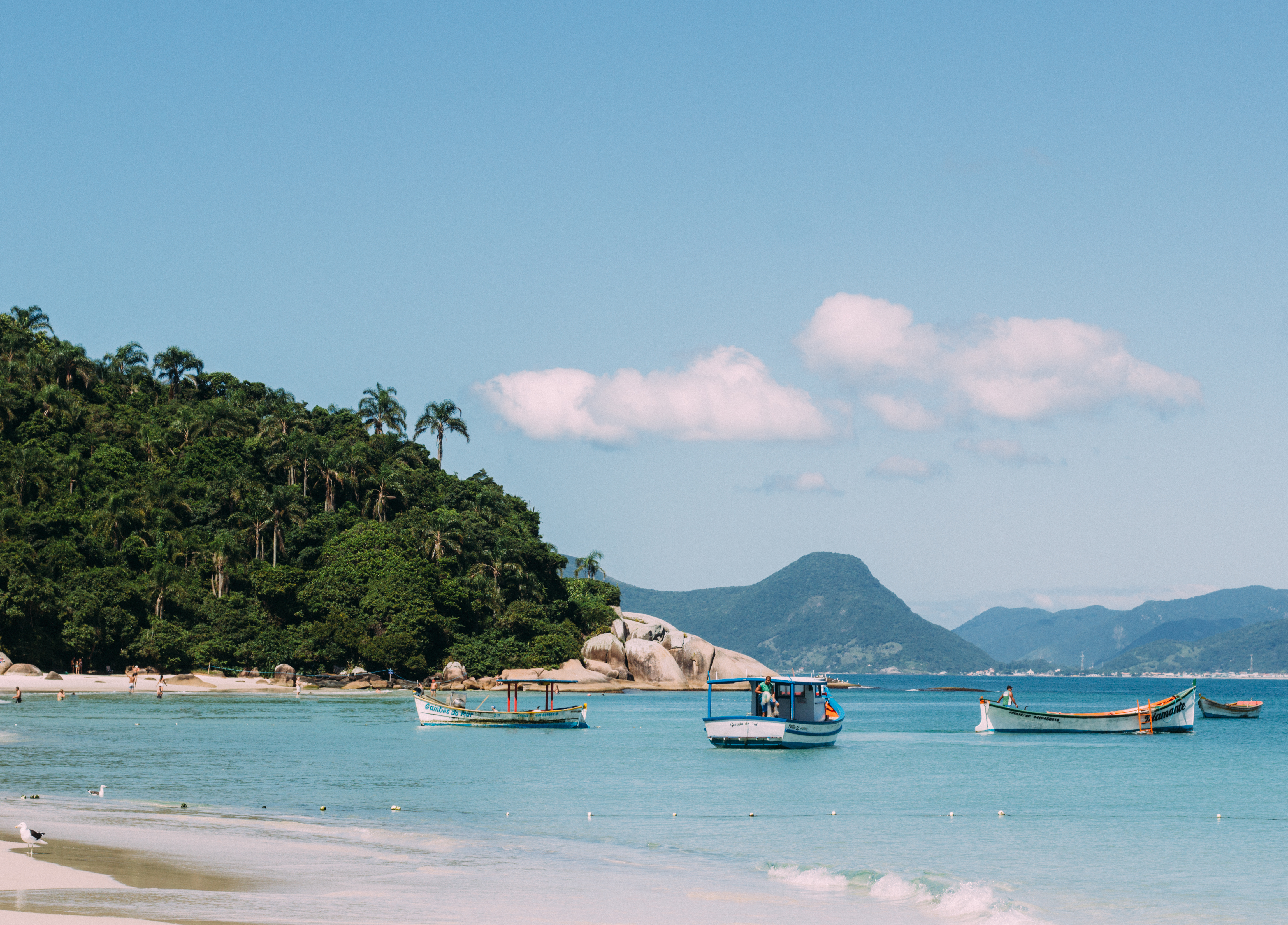 Ilha do Campeche: sítio arqueológico e paisagístico